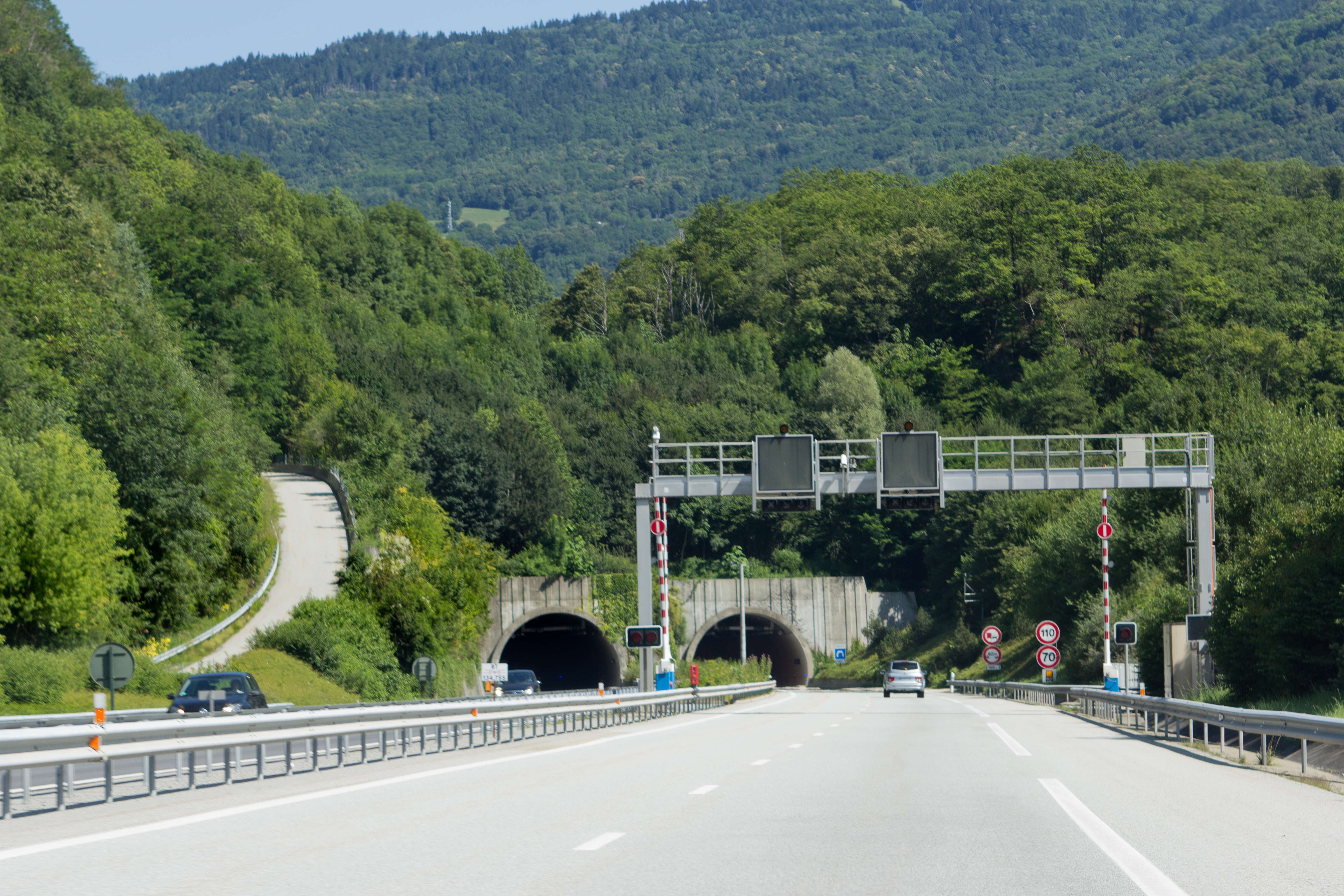 Autoroute A43 (La Maurienne), département de Savoie, France. Tunel d'Aiguebelle - coté sud - vue direction en Montmélian